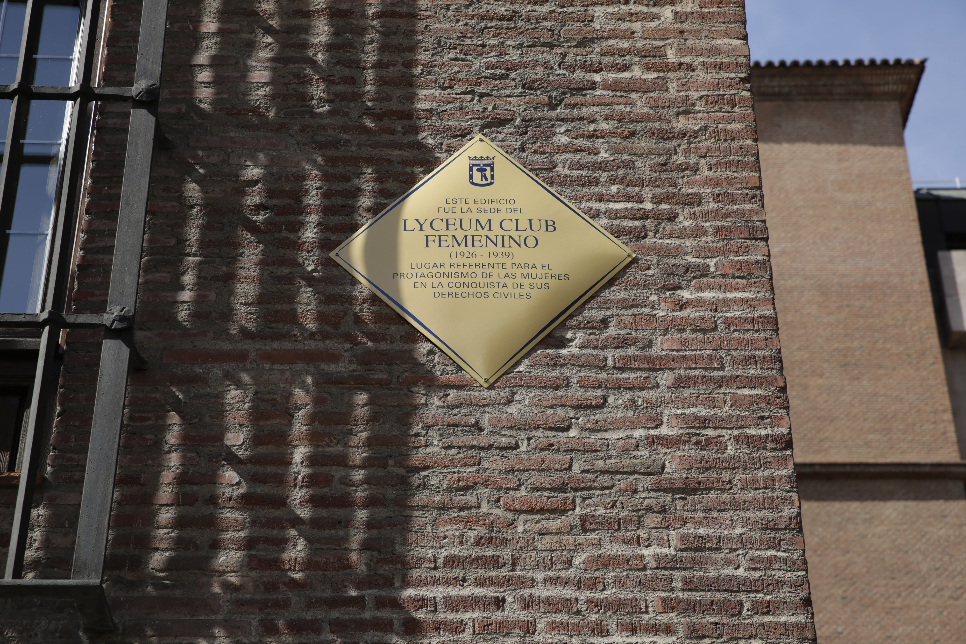 La ONU estableció el 8 de marzo como fecha para celebrar el Día Internacional de la Mujer. Fue en 1975. Más de cuatro décadas después, hoy 8 de marzo, la alcaldesa de Madrid, Manuela Carmena, ha querido recordar a una de las primeras y más influyentes asociaciones de mujeres en España: el Lyceum Club Femenino, de la que fueron socias ilustres intelectuales de la Generación del 27. Una placa en el edificio que albergó a esta entidad desde 1926 hasta 1939 mantendrá vivo ese recuerdo. Está situado en la plaza del Rey esquina con la calle de las Infantas, es conocido como la Casa de las Siete Chimeneas y actualmente es propiedad del Ministerio de Cultura.